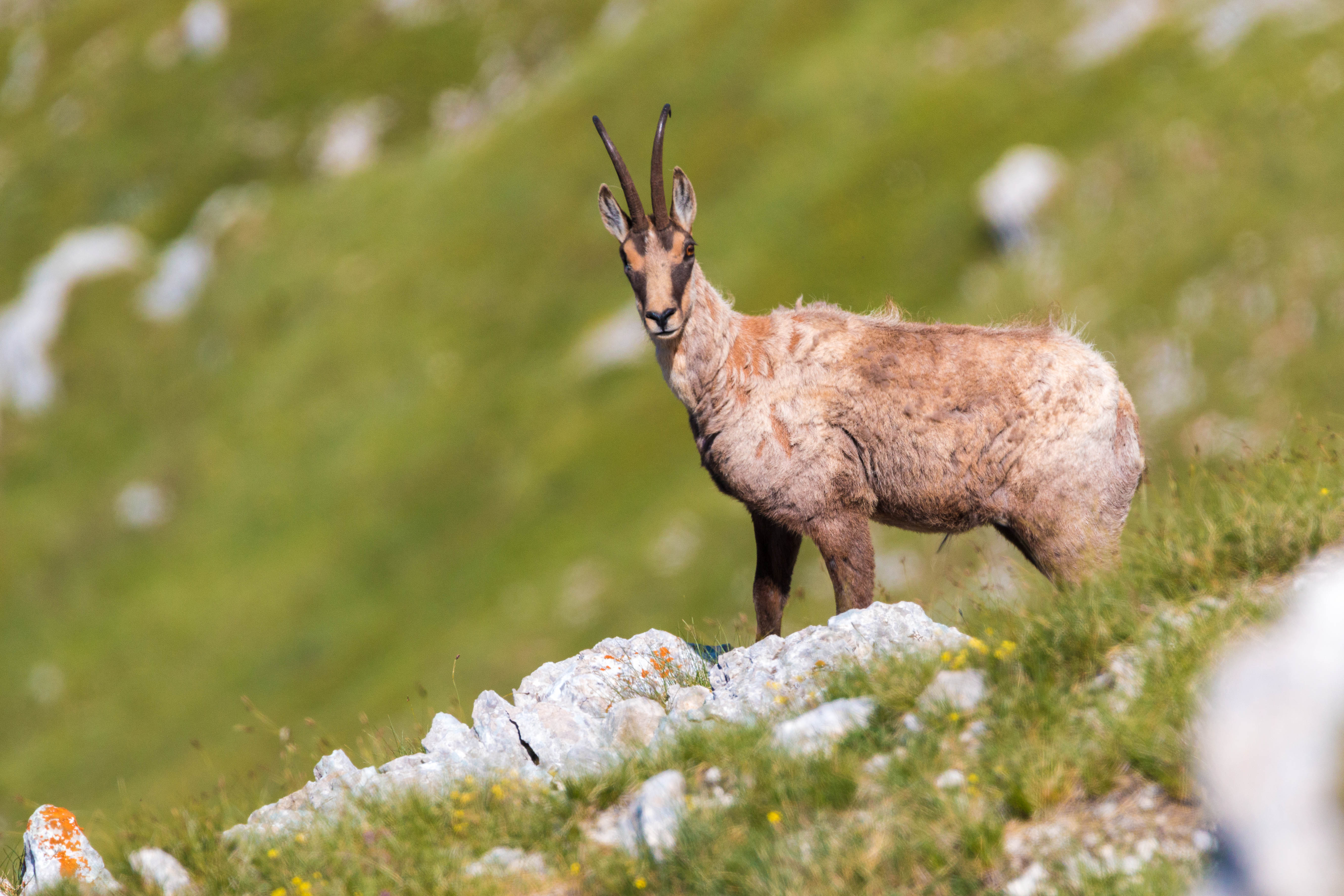 Camoscio sul monte Marsicano This is a photo of a monument which is part of cultural heritage of Italy.